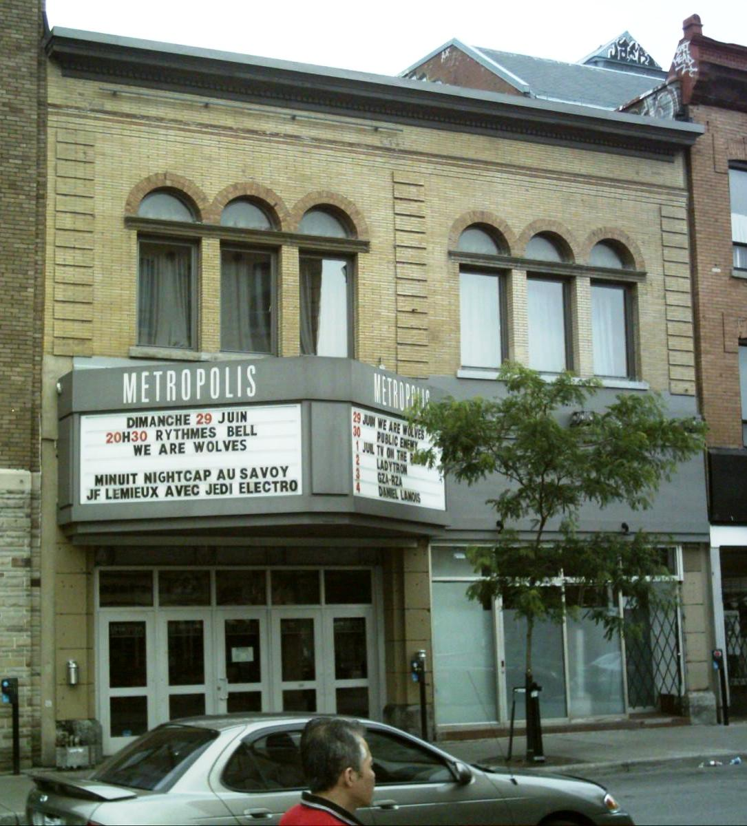 Le Métropolis est une salle de spectacle de Montréal située au 54 rue Sainte-Catherine est.